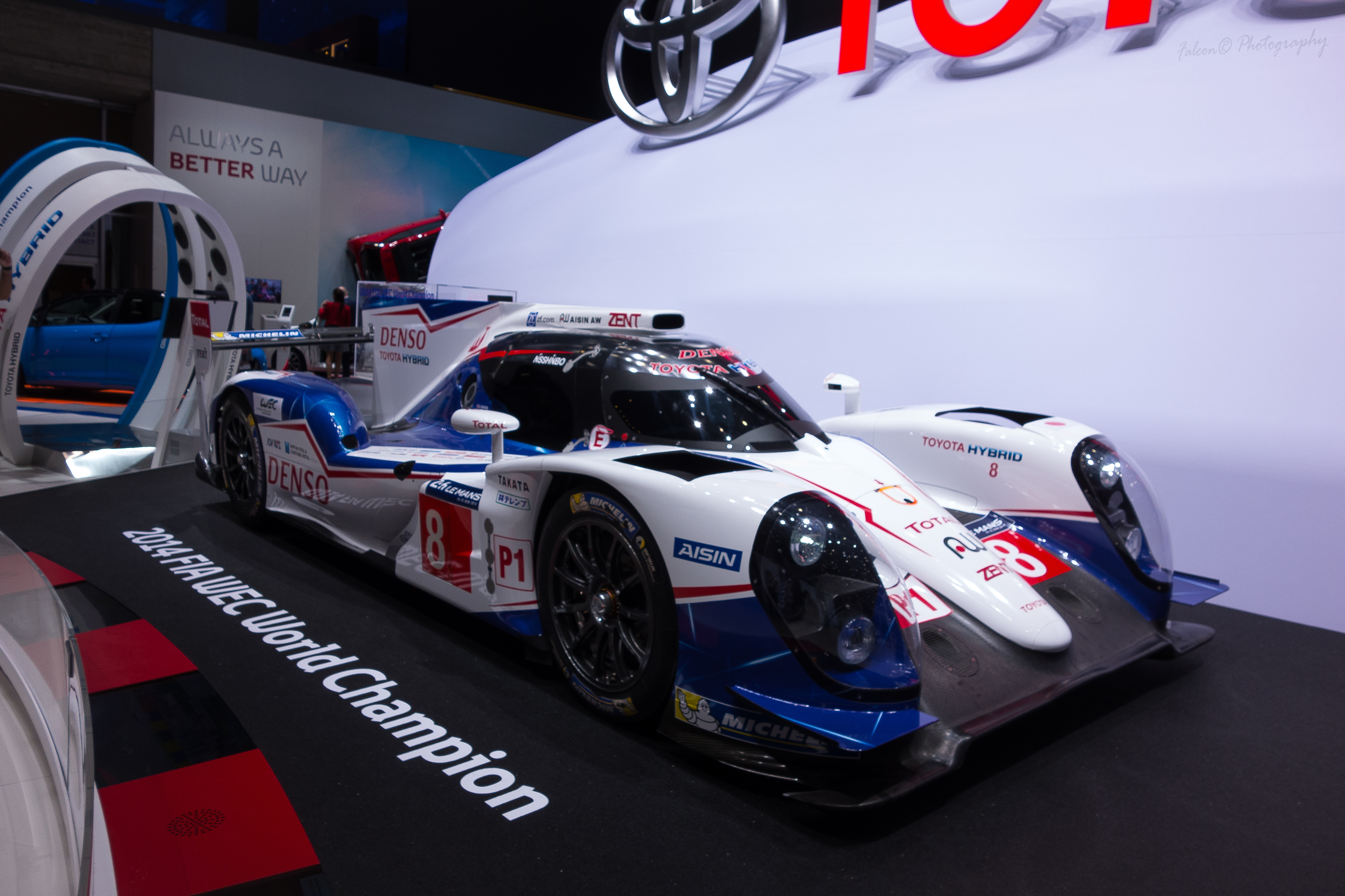 24h Du Mans